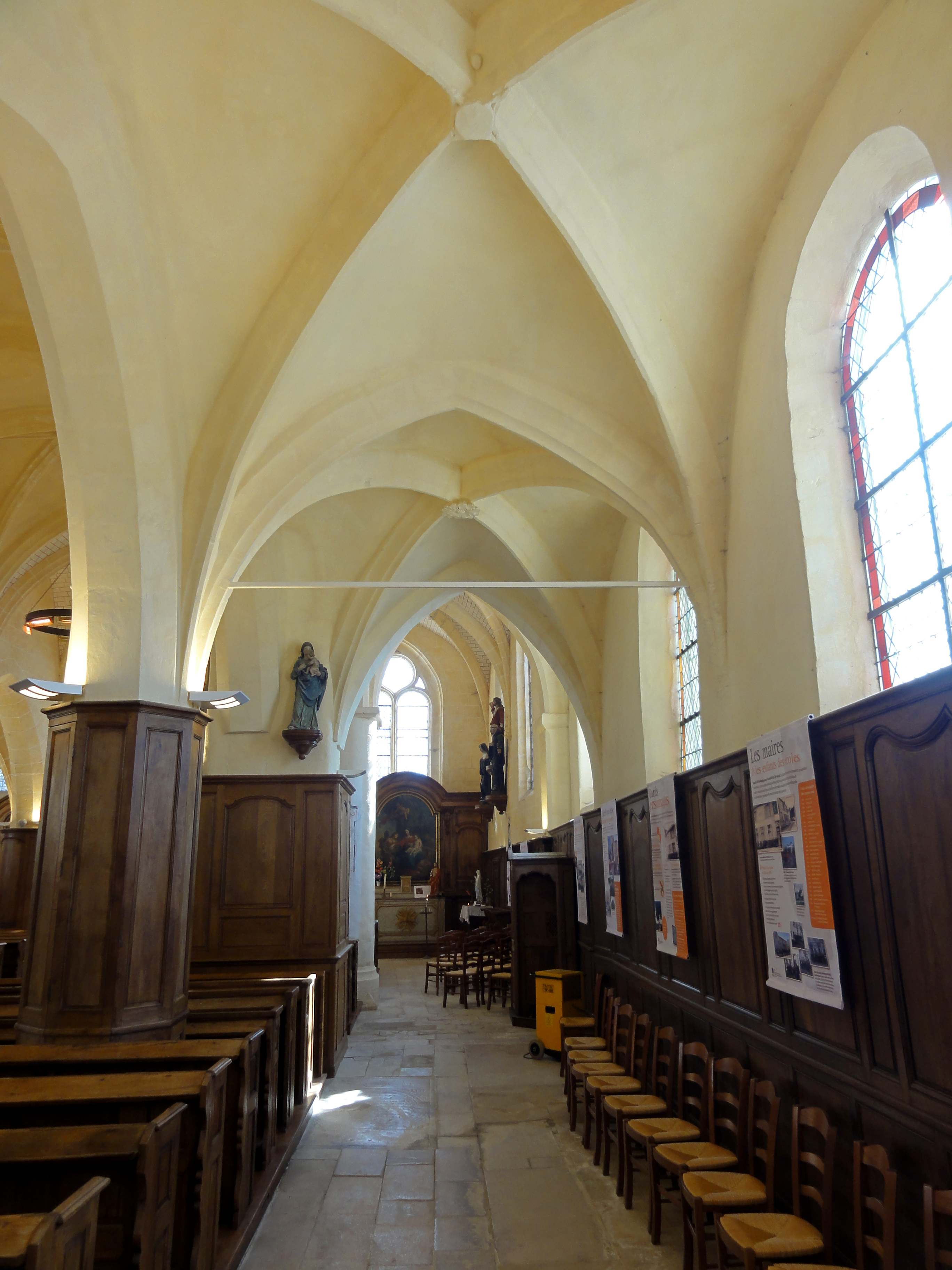 Interieur de l'église (voir titre).